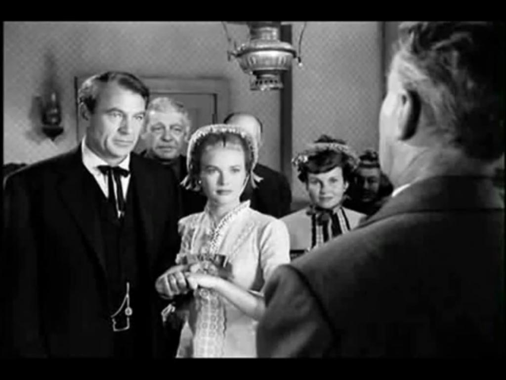 Captura de pantalla del tràiler de la pel·lícula High Noon amb Grace Kelly i Gary Cooper